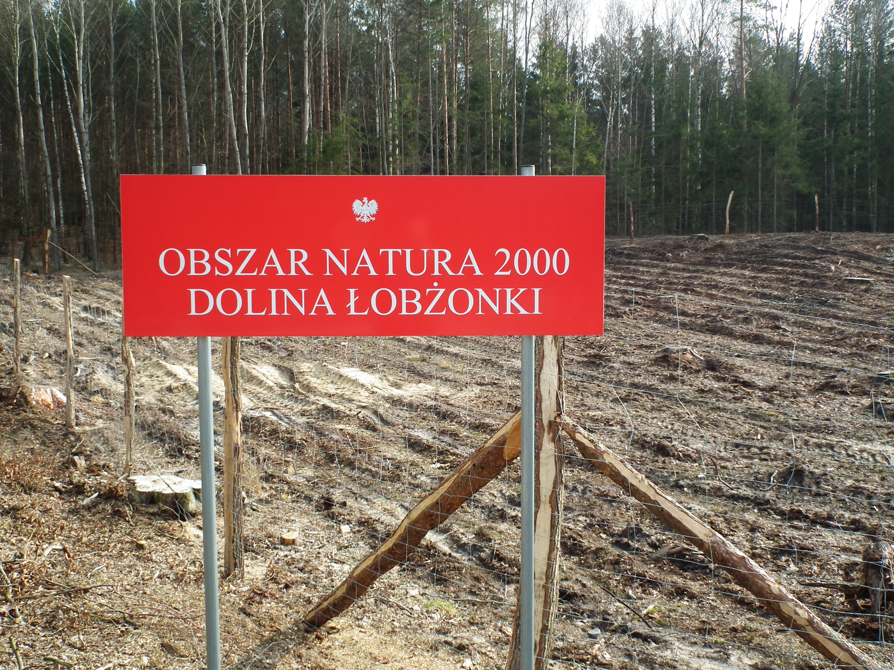 Obszar chroniony Dolina Łobżonki koło Lutówka.